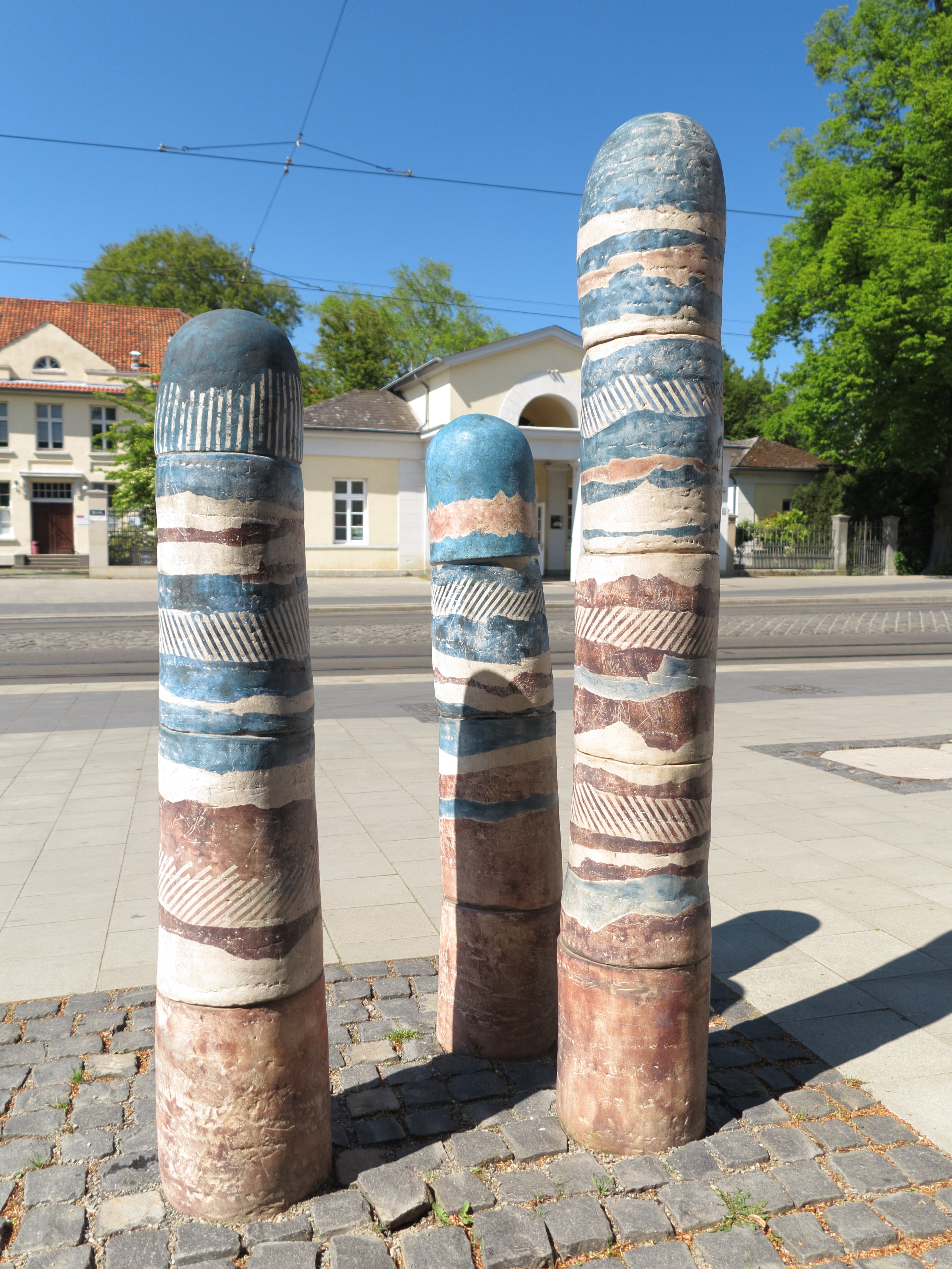 Braunschweig: die dreiteilige Keramik-Skulptur ’Asparagus’ der Braunschweiger Künstlerin Ina Otto vor dem Torhaus Humboldtstraße 34.